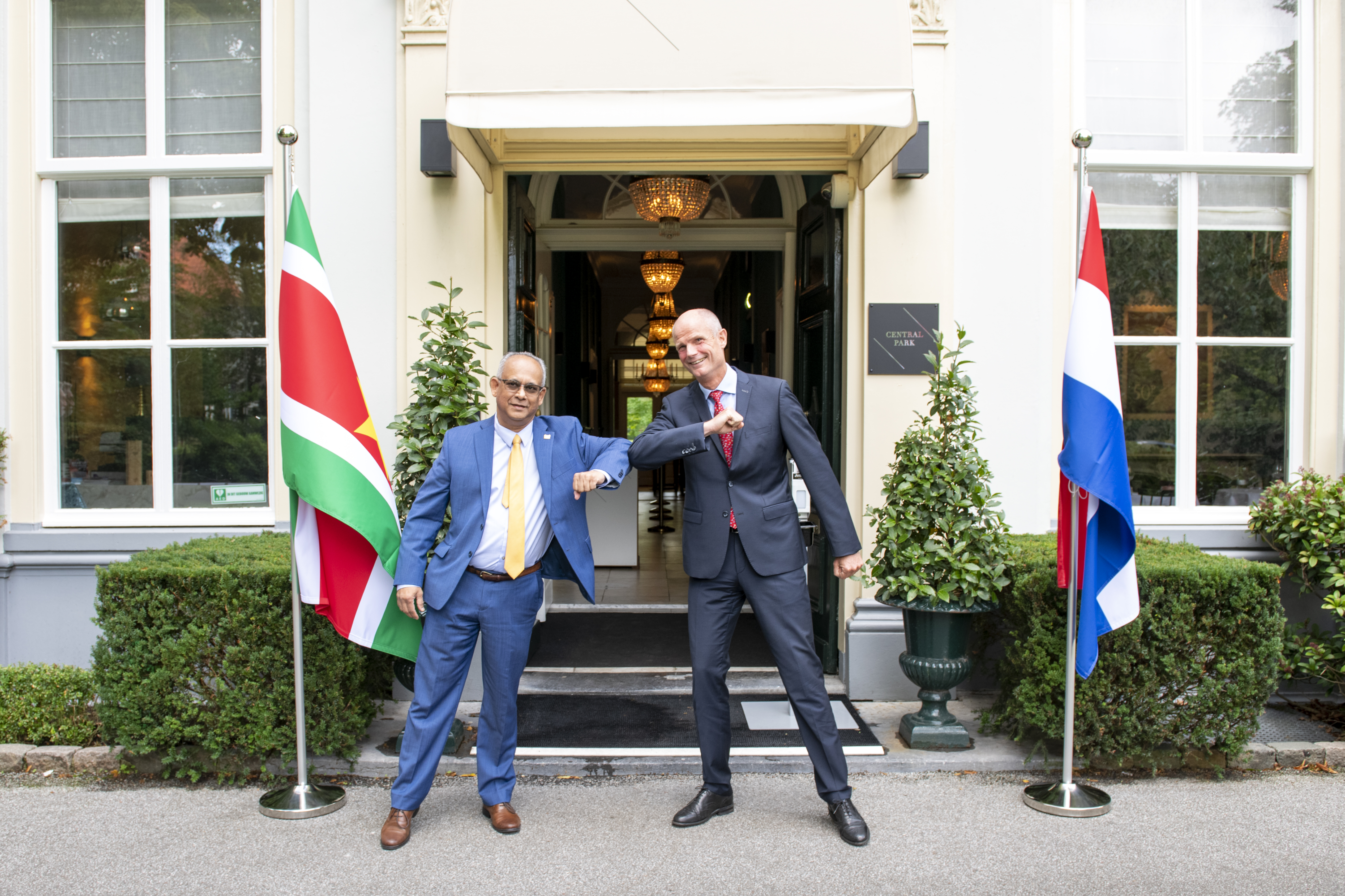 Minister Blok ontving vandaag in Voorburg zijn Surinaamse collega Ramdin.